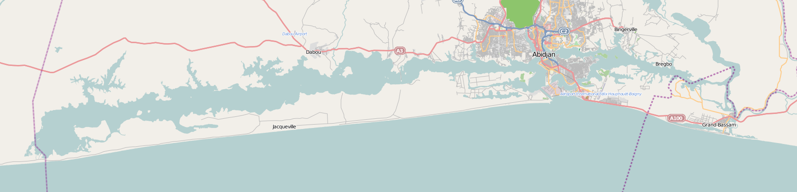 Carte Lagune Ebri